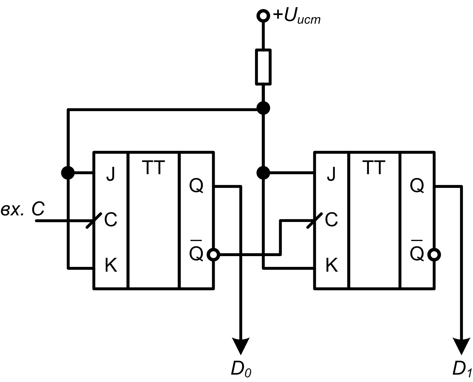 Двухразрядный двоичный счётчик с последовательной организацией переноса на T-триггере.